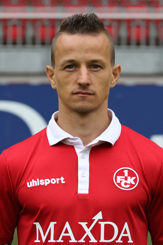 Robert Pich